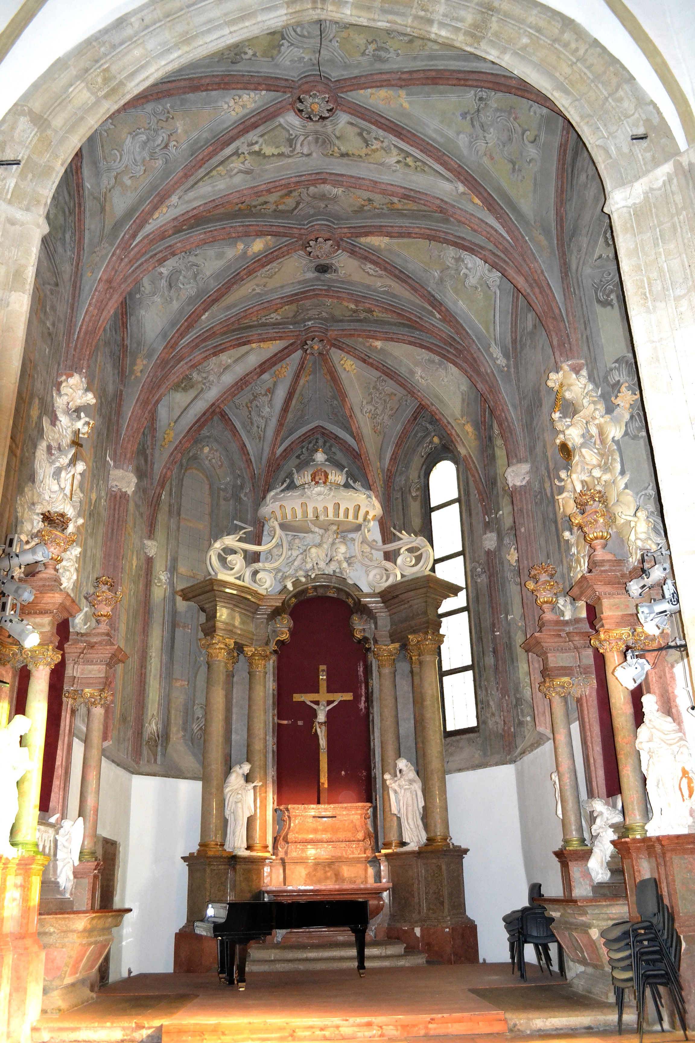 Pohľad do presbytéria kostola